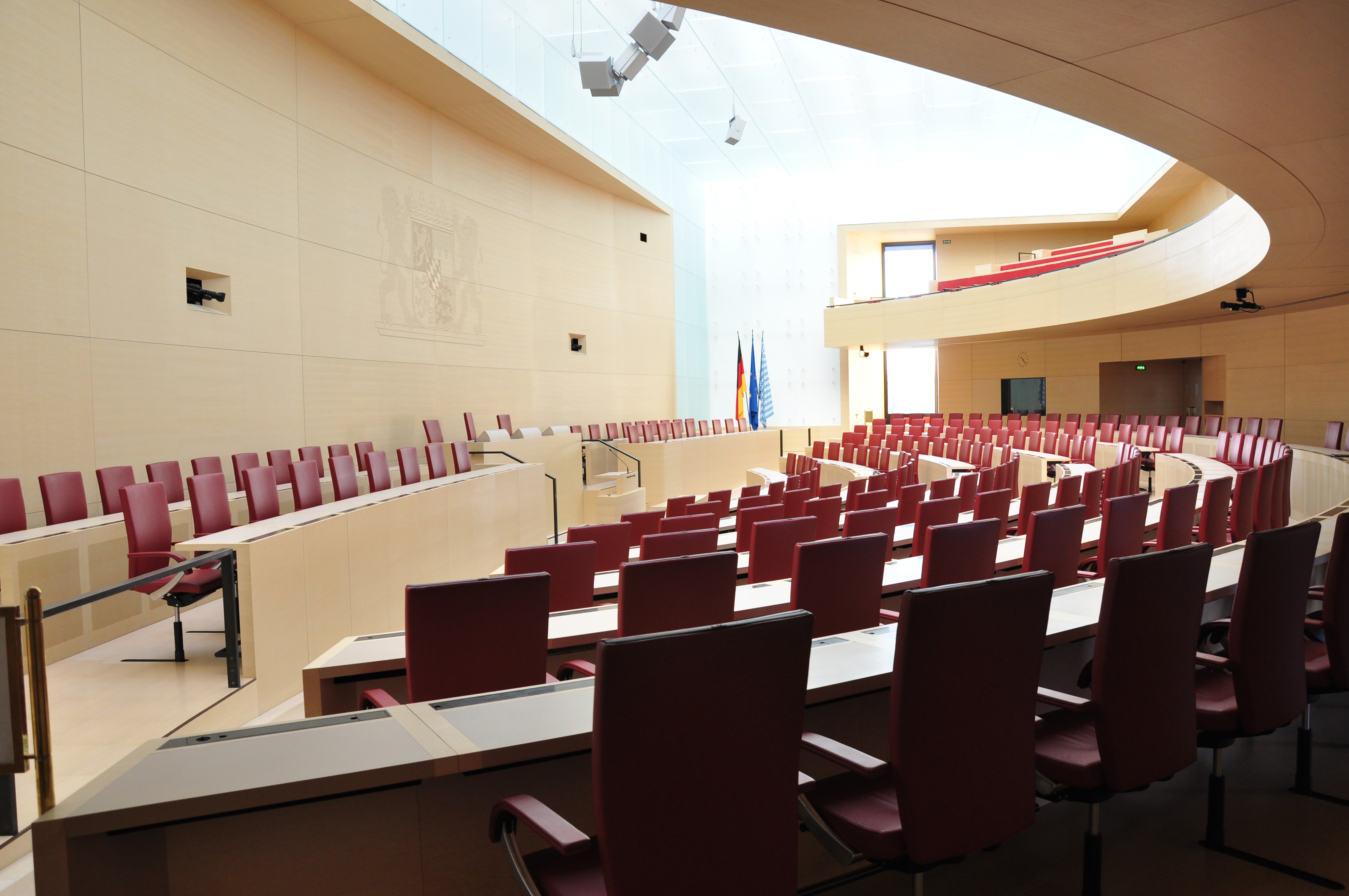 Neuer Plenarsaal im Bayerischen Landtag